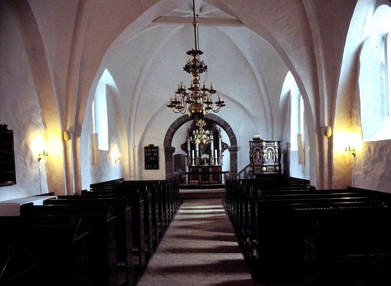 Brønderslev gamle Kirke i Danmark. Skibet set mod øst